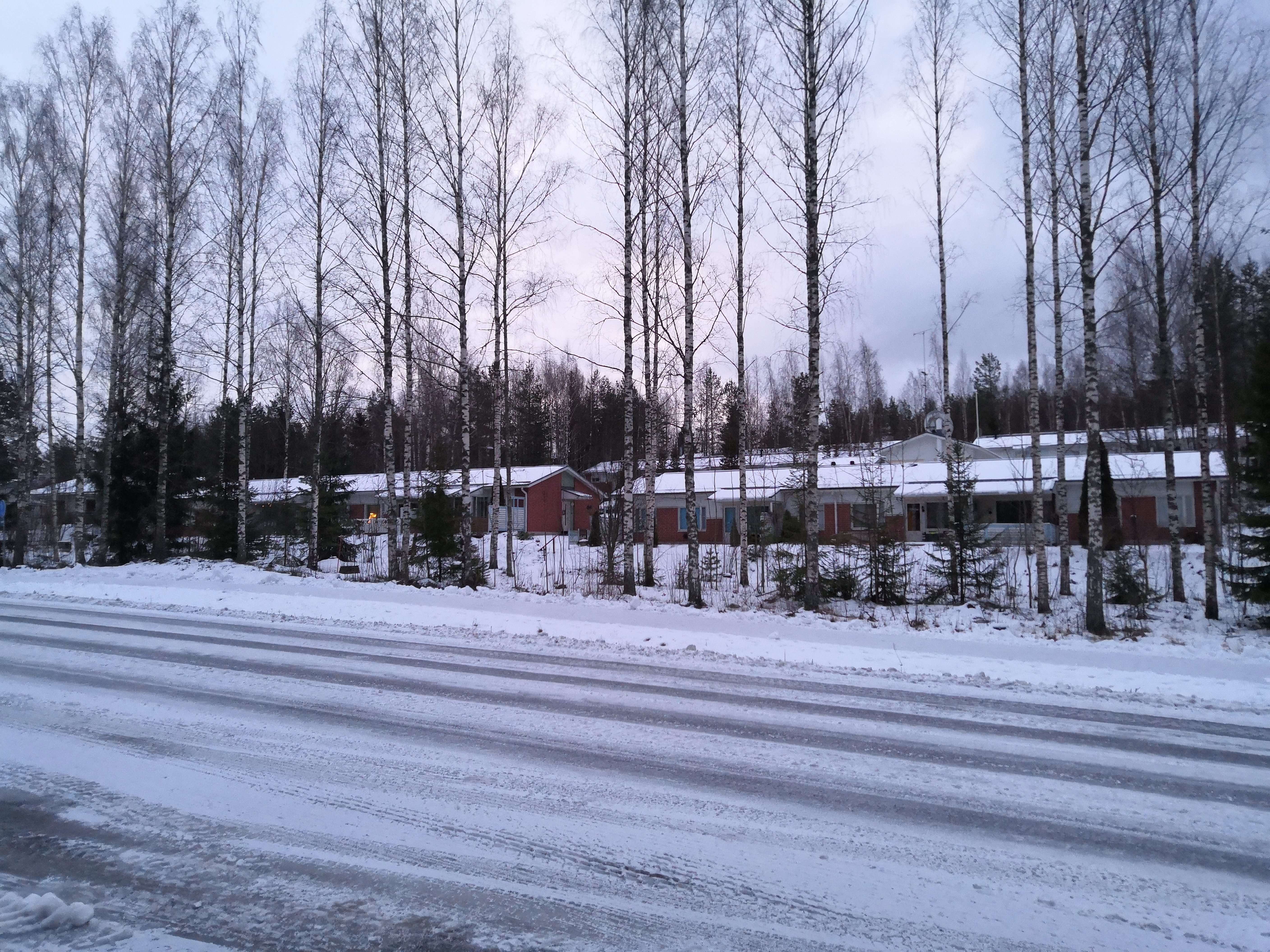 Rivitaloasutusta Valkealan Niinistössä